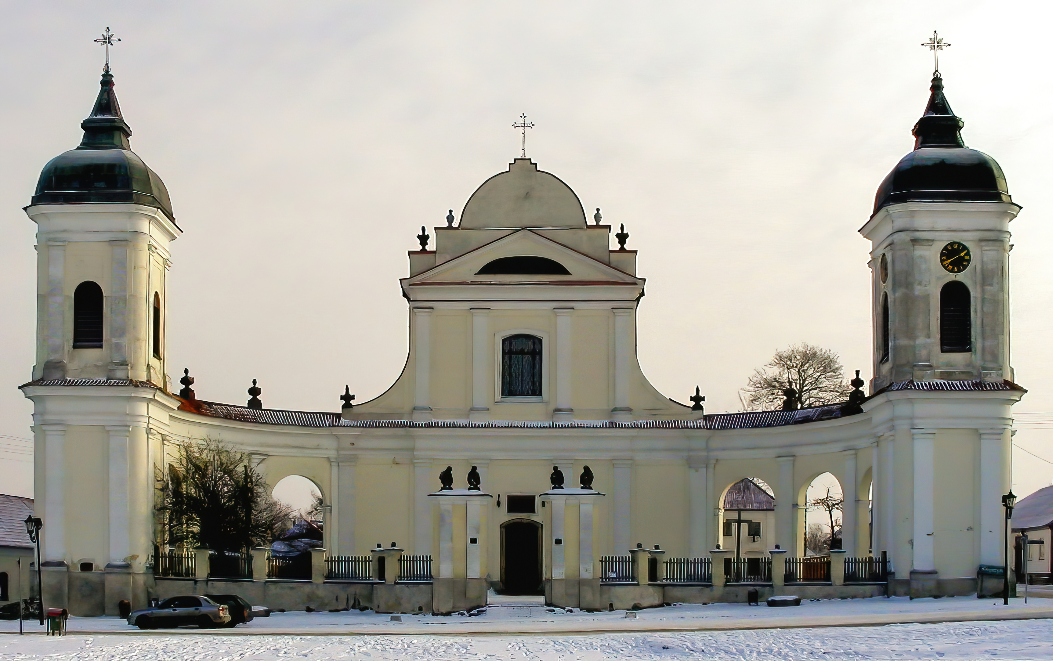 Kościół Świętej Trójcy w Tykocinie